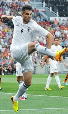 Дам'єн Ле Таллек — французький футболіст, під час виступів за Говерлу